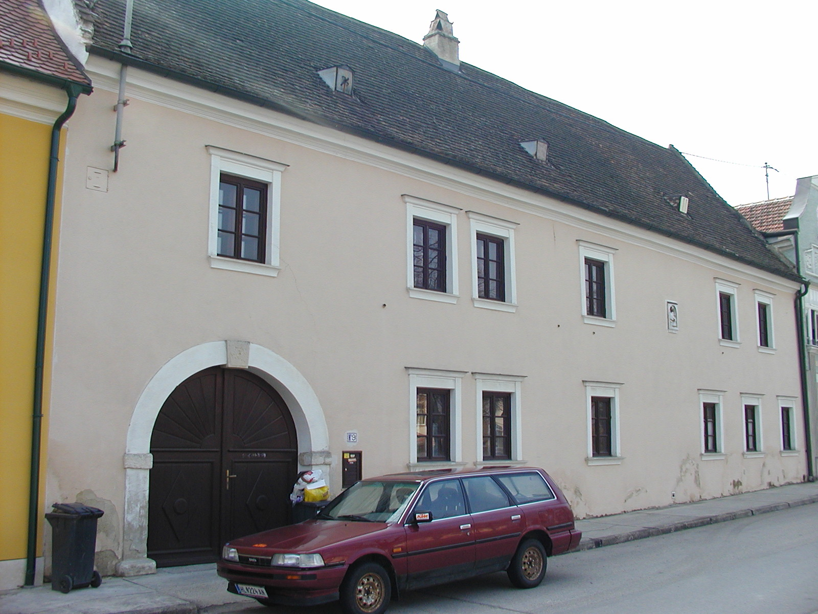 Sitzendorf Hauptplatz 9